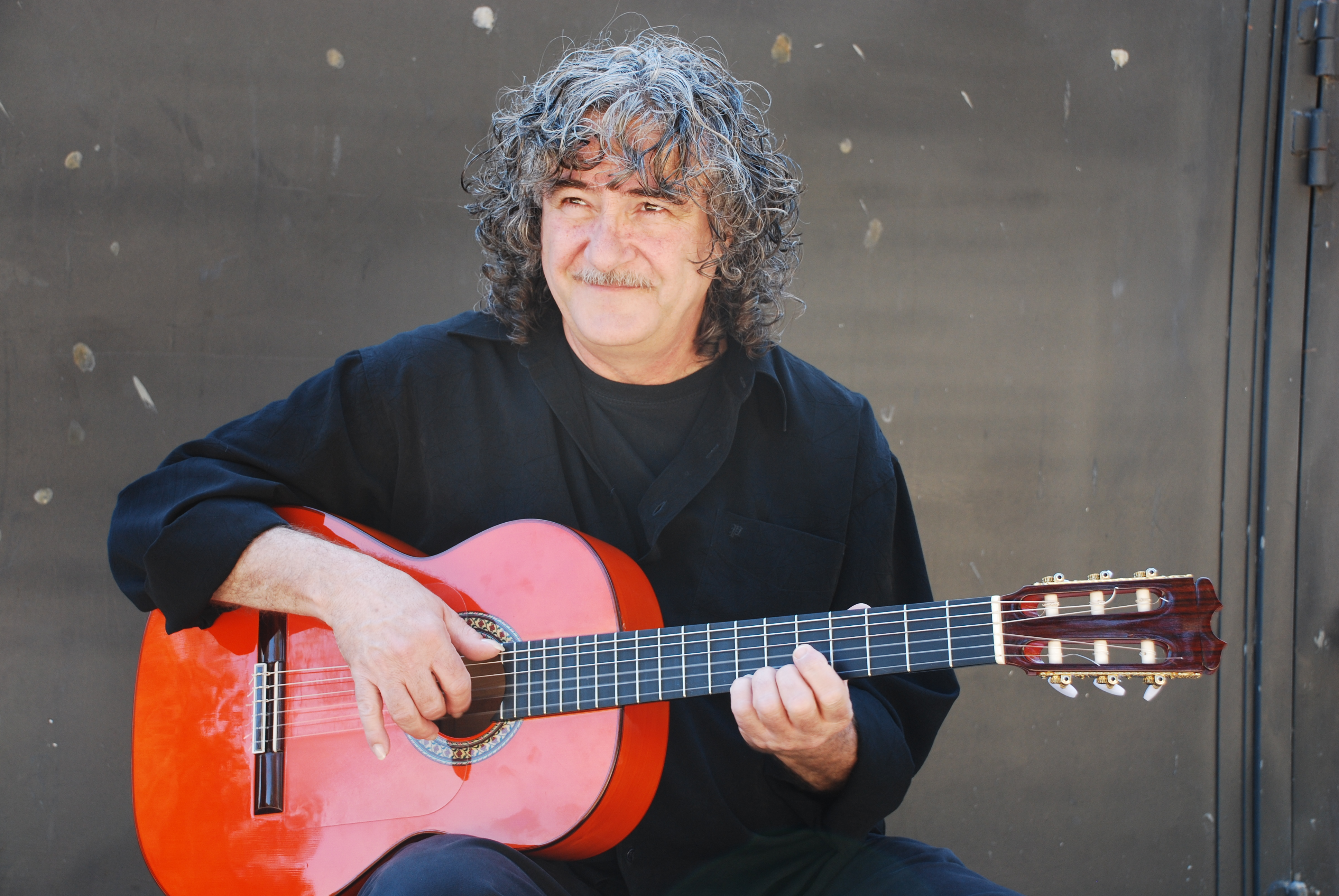 תמונה של גיטריסט הפלמנקו באלדי אולייר